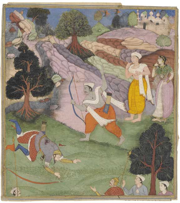 Bhismha and Arjuna Razmnama